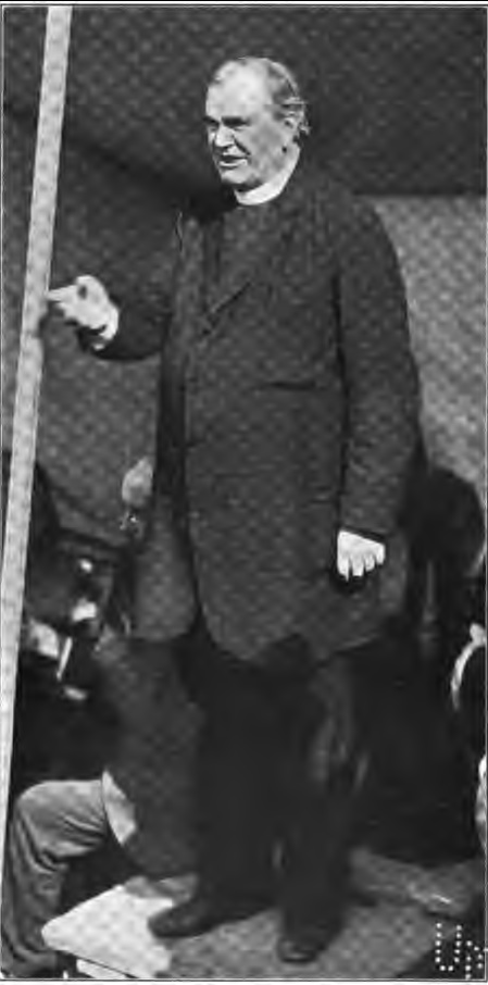 Fr. Edward McGlynn, 1898